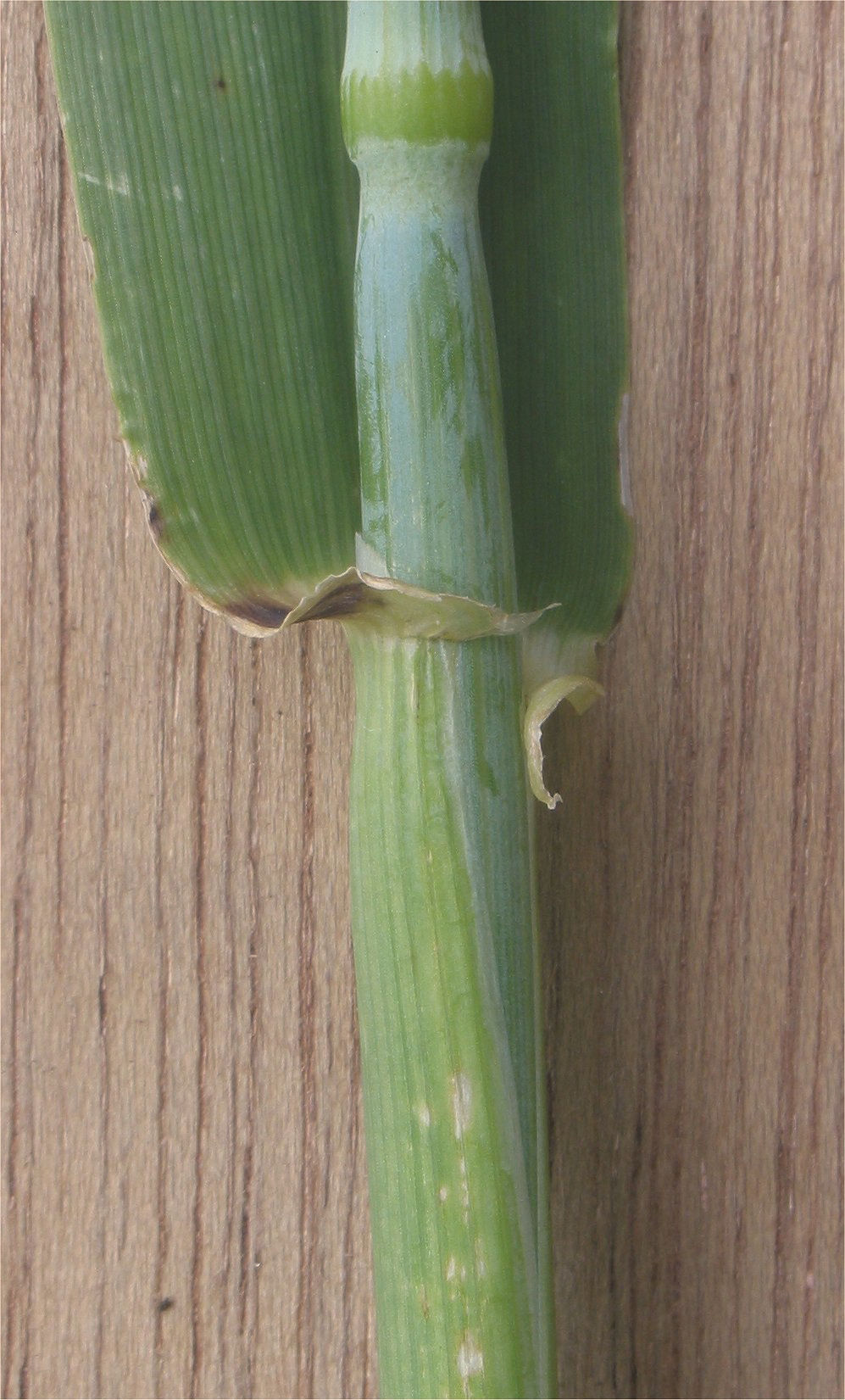 (Gerst oortjes) Hordeum vulgare auricles